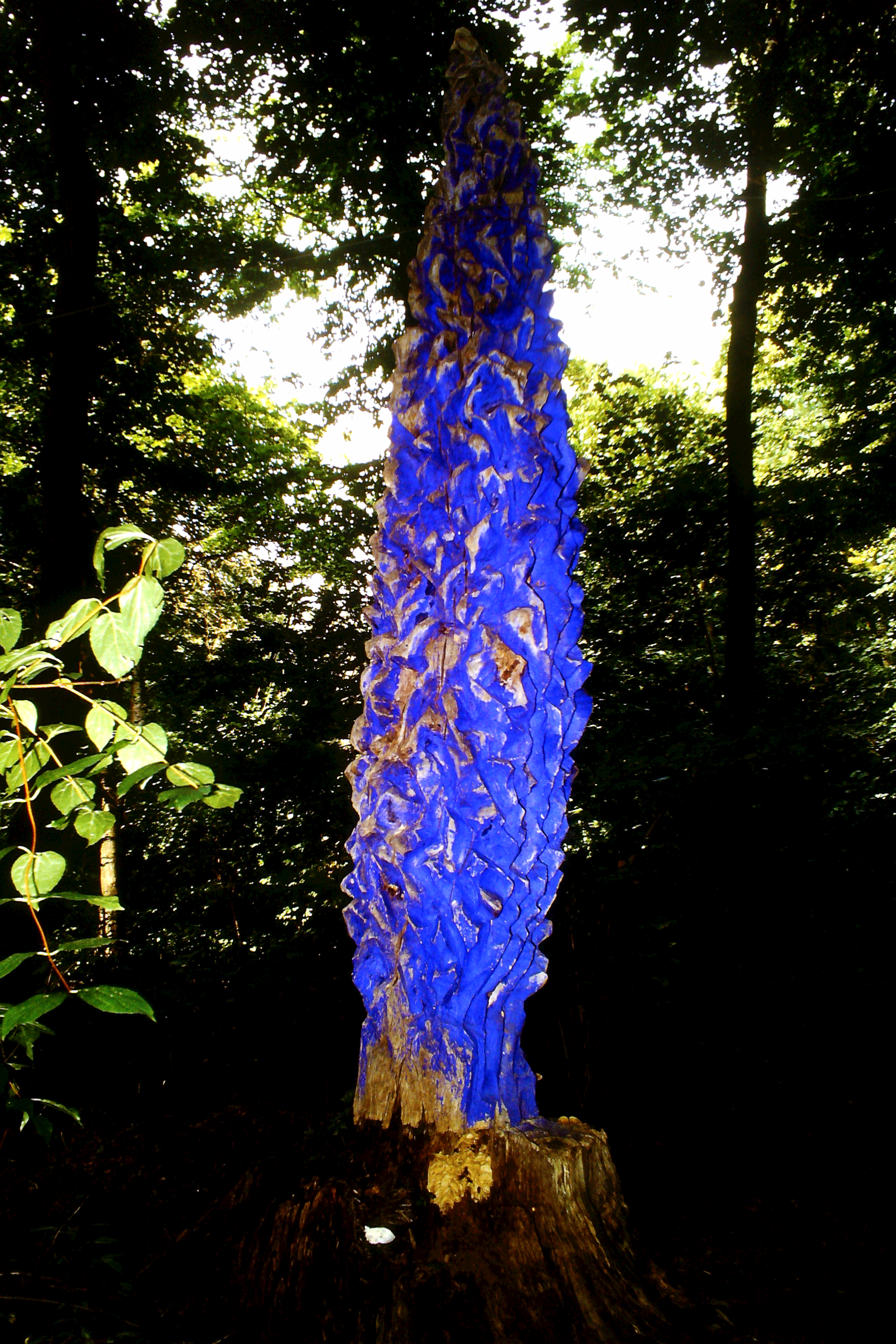 Mit der Blauen Pappel begann die Ausstellungsreihe "Kunst am Baum".